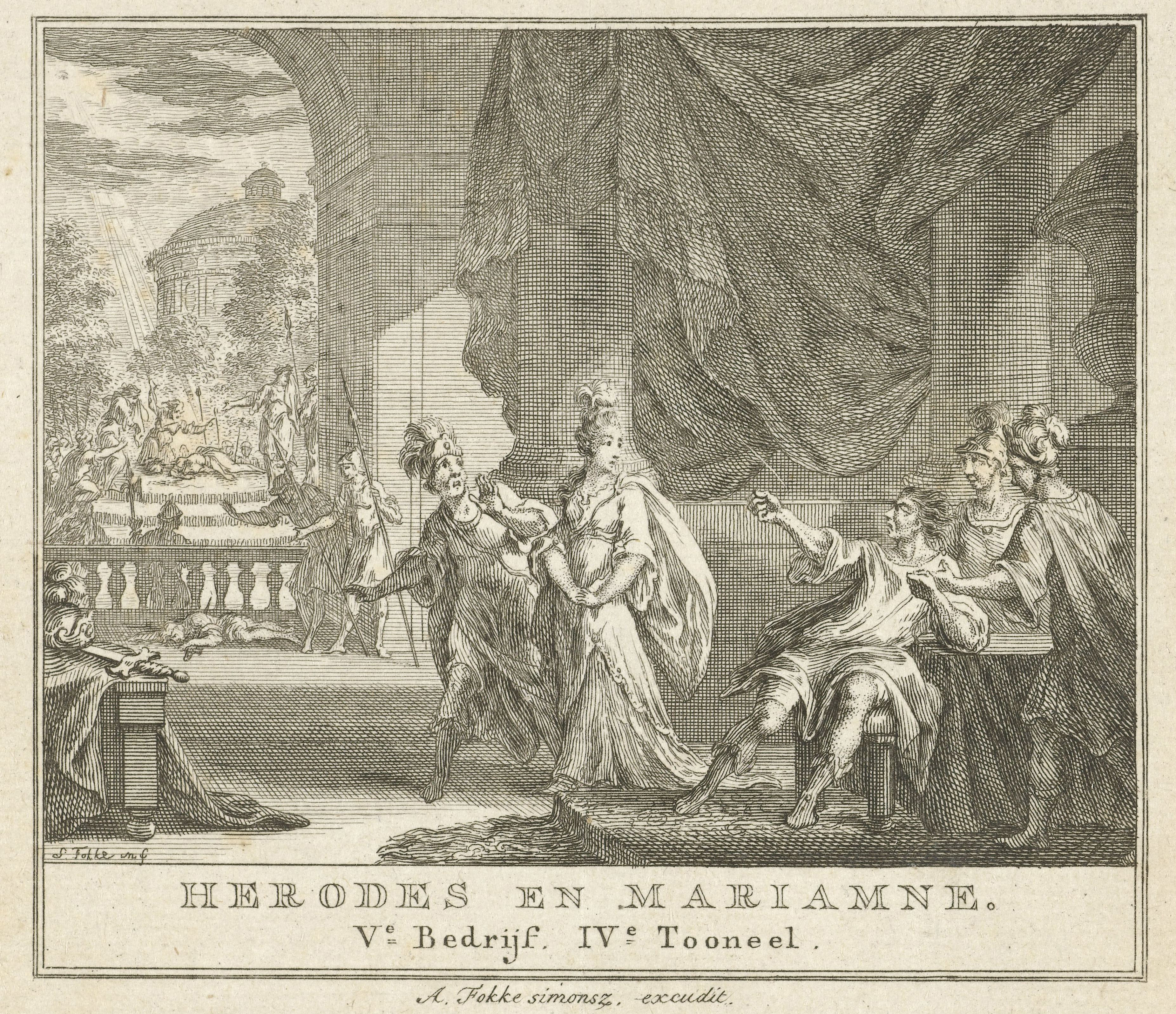 Gravure